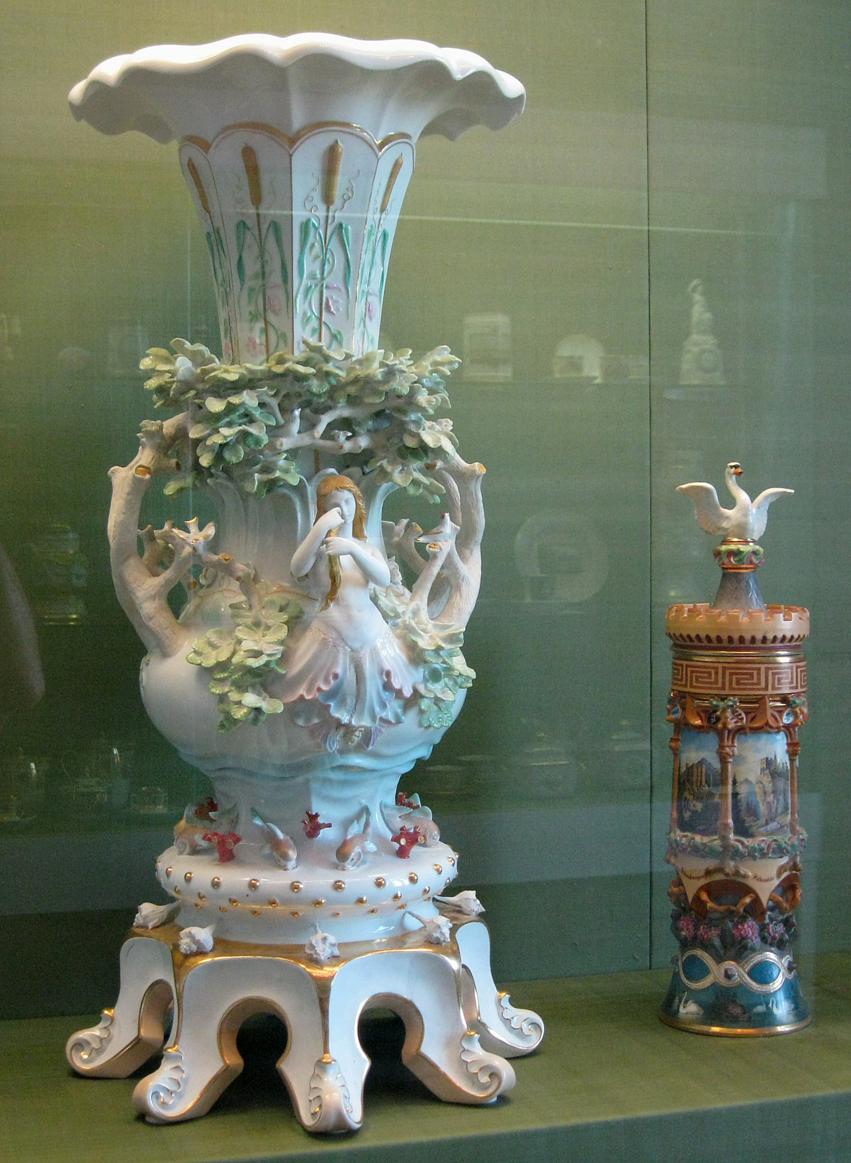 Vase mit Seejungfrauen, Eugen Napoleon Neureuther, um_1850-55, Porzellanmanufaktur Nymphenburg, Porzellanmuseum München